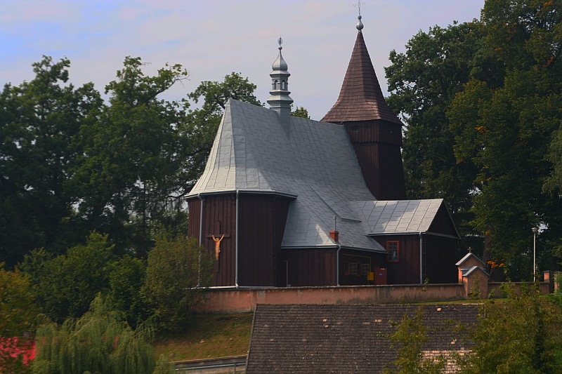 Kościół pw. Św. Anny w Święcanach. Zbudowany okolo 1520r. Jeden z cenniejszych drewnianych kościołow na Podkarpaciu